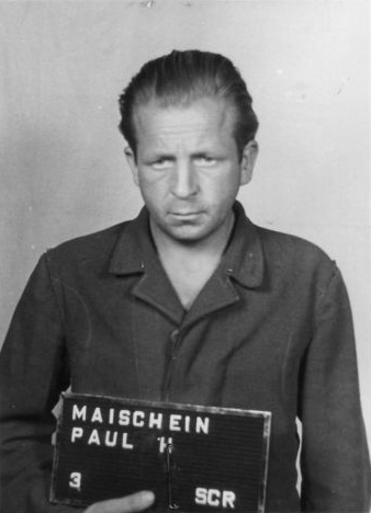 Haftbogenfoto des Angeklagten Paul H. Maischein (06.06.1912 - ?), SS-Rottenführer, als SDG Krankenpfleger im Konzentrationslager Mittelbau-Dora sowie in dessen Außenlager Rottleberode, im Dachauer Dora-Prozess ("Case No. 000-50-37 Dora") am 30.12.1947 zu fünf Jahren Haft verurteilt.